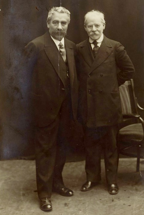 הדפס כסף מקורי מתצלום שבו נראים זה לצד זה שני סופרי היידיש יצחק לייבוש פרץ (משמאל) ויעקב דינזון. בגב התצלום, נוספה הקדשה בכתב ידו של דינזון ובחתימת ידם של השניים: "למרת לאה פרושאנסקא לבית לעווין-עפשטיין, לזכרון מאת י"ל פרץ - י. דינעזאהן". תח הקדשה זו נוספה הערה בכתב ידו של ד"ר אברהם שבדרון, לפיה התצלום נתרם לאוסף בחודש ניסן תרצ"ה על ידי מקבלת התצלום, גב' לאה פרושנסקי.